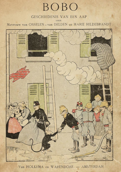 omslagtekening van "Bobo: geschiedenis van een aap" door Bertha Elisabeth van Delden (1847–1936) Alternative namesBertha Elisabeth van Osselen-van DeldenDescription Dutch children's writer Date of birth/death27 April 18474 June 1936Location of birth/deathDiepenheimHeerdeWork period1891-1936Work locationNunspeet, Amsterdam, Template:'s-Gravenhage en Template:HeerdeAuthority control VIAF: 31746310 ISNI: 0000 0000 4877 2262 LCCN: no2006034620 GND: 103182989X WorldCat en Marie Hildebrandt